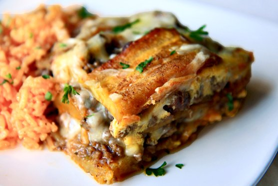 Puerto Rican Lasagna